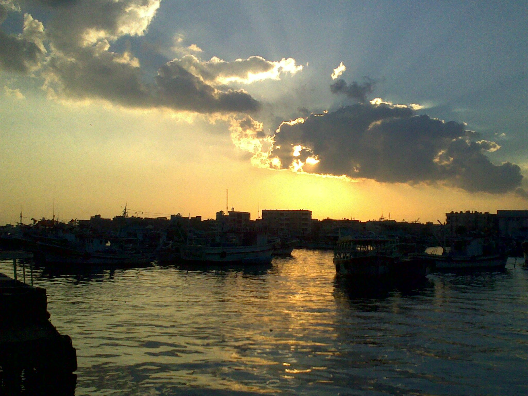 صرة لجزء من مدينة راس البر